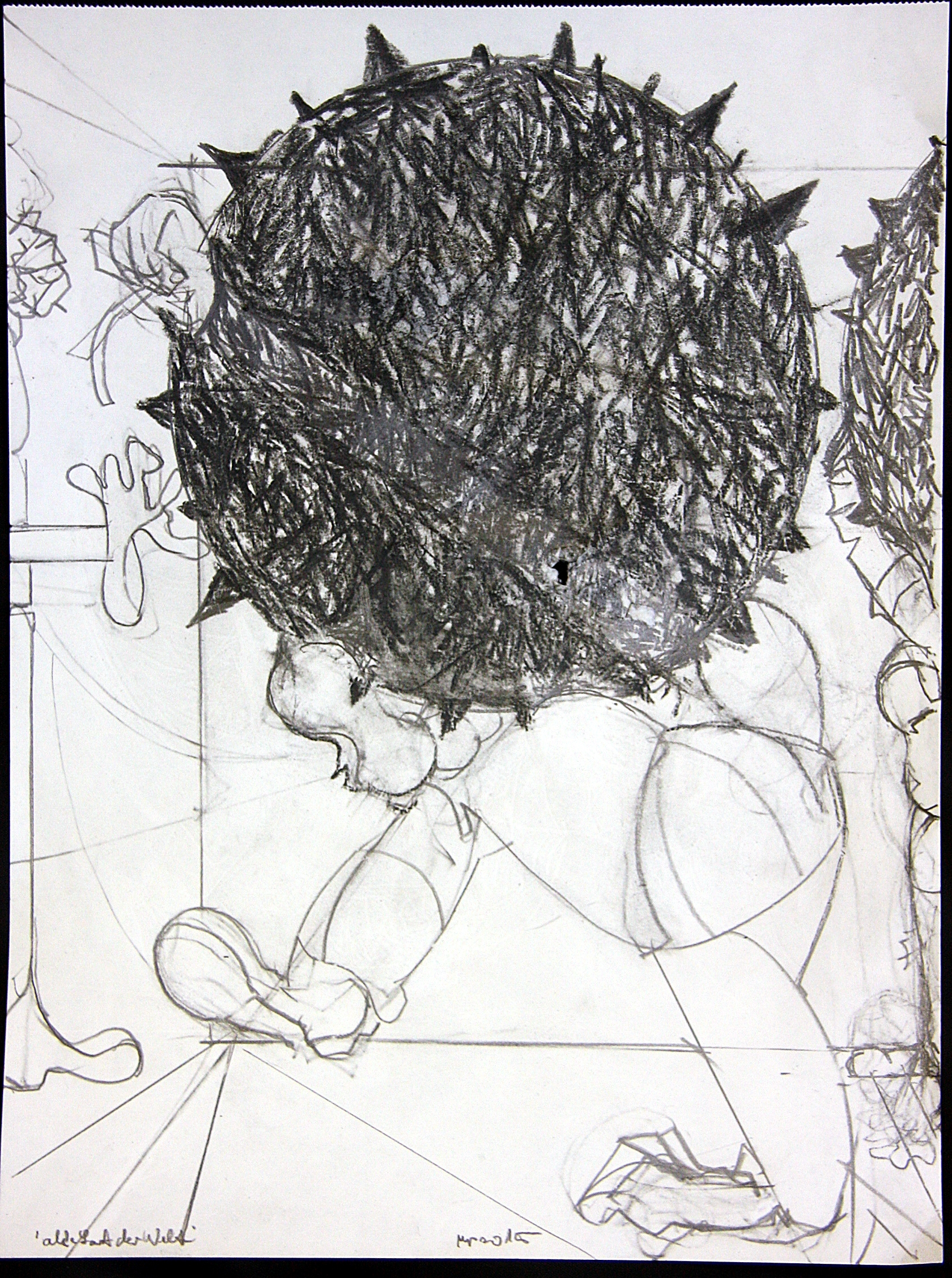 Hermann-Josef Mispelbaum, Bleistiftzeichnung, Erdlast, 30x40 cm, 2015